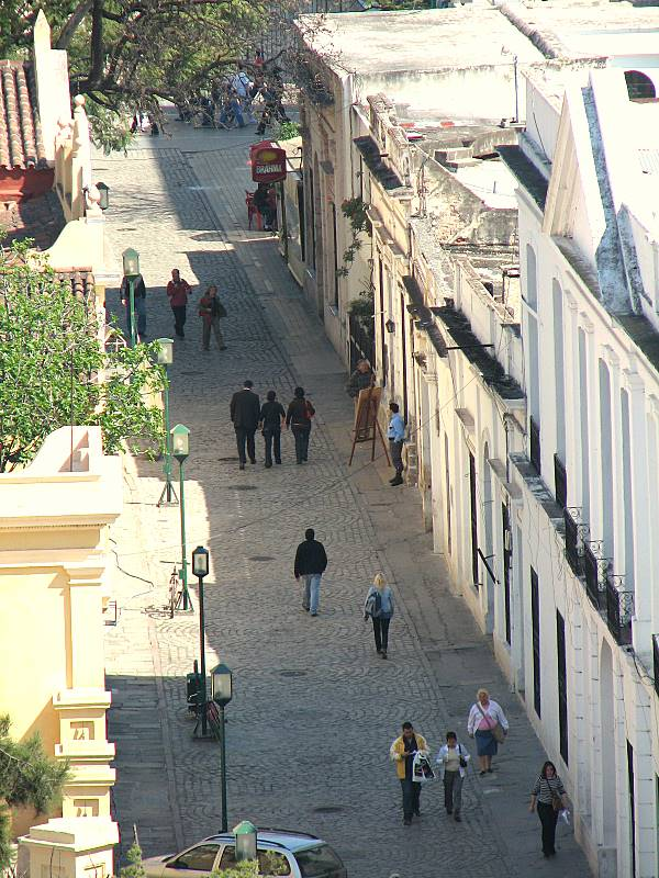 Peatonal que sale desde uno de los costados de la Plaza San martín, en el centro de Córdoba.